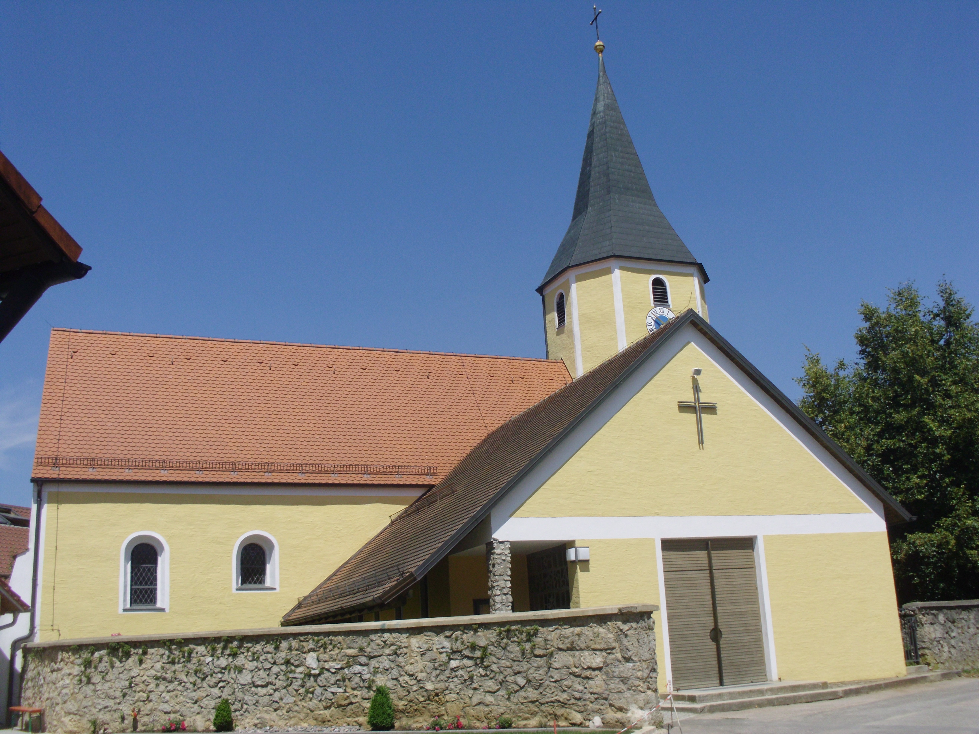 Expositurkirche St. Jakob in Hamberg, Ortsteil von Breitenbrunn im Landkreis Neumarkt i. d. Opf., errichtet 1884, mit Langhausanbau von 1977